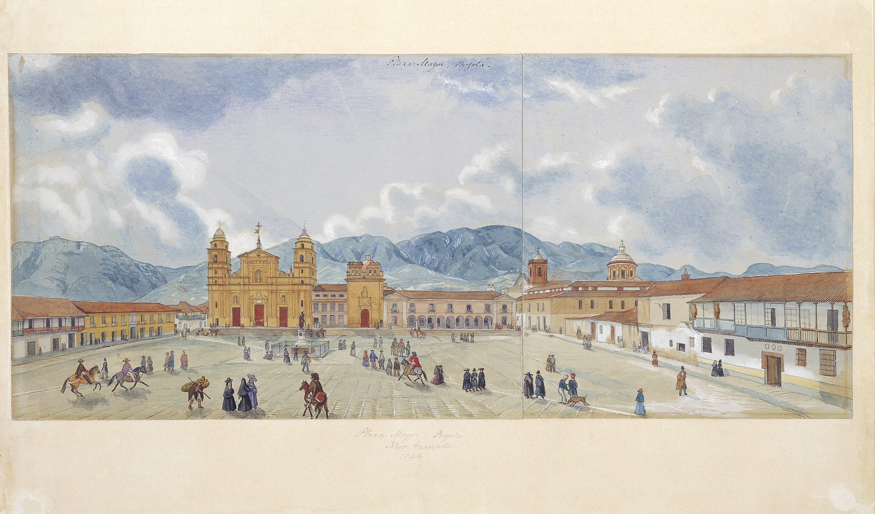 Plaza Mayor de Bogotá, 1846. Acuarela de Edward Mark. Biblioteca Luis Ángel Arango, Banco de la República.